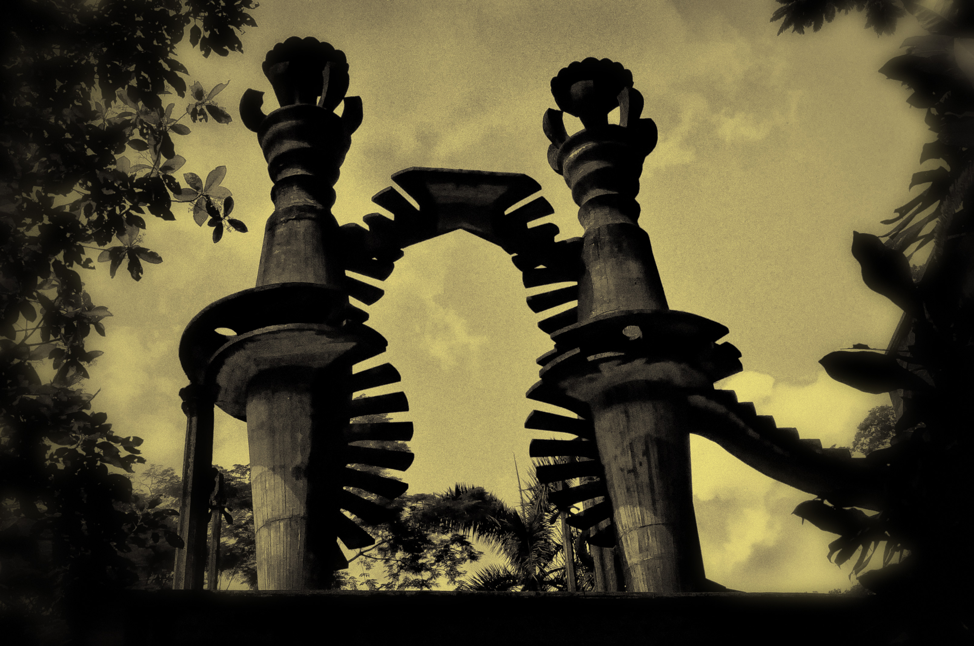 Staircase to Heaven - Las Pozas de Xilitla